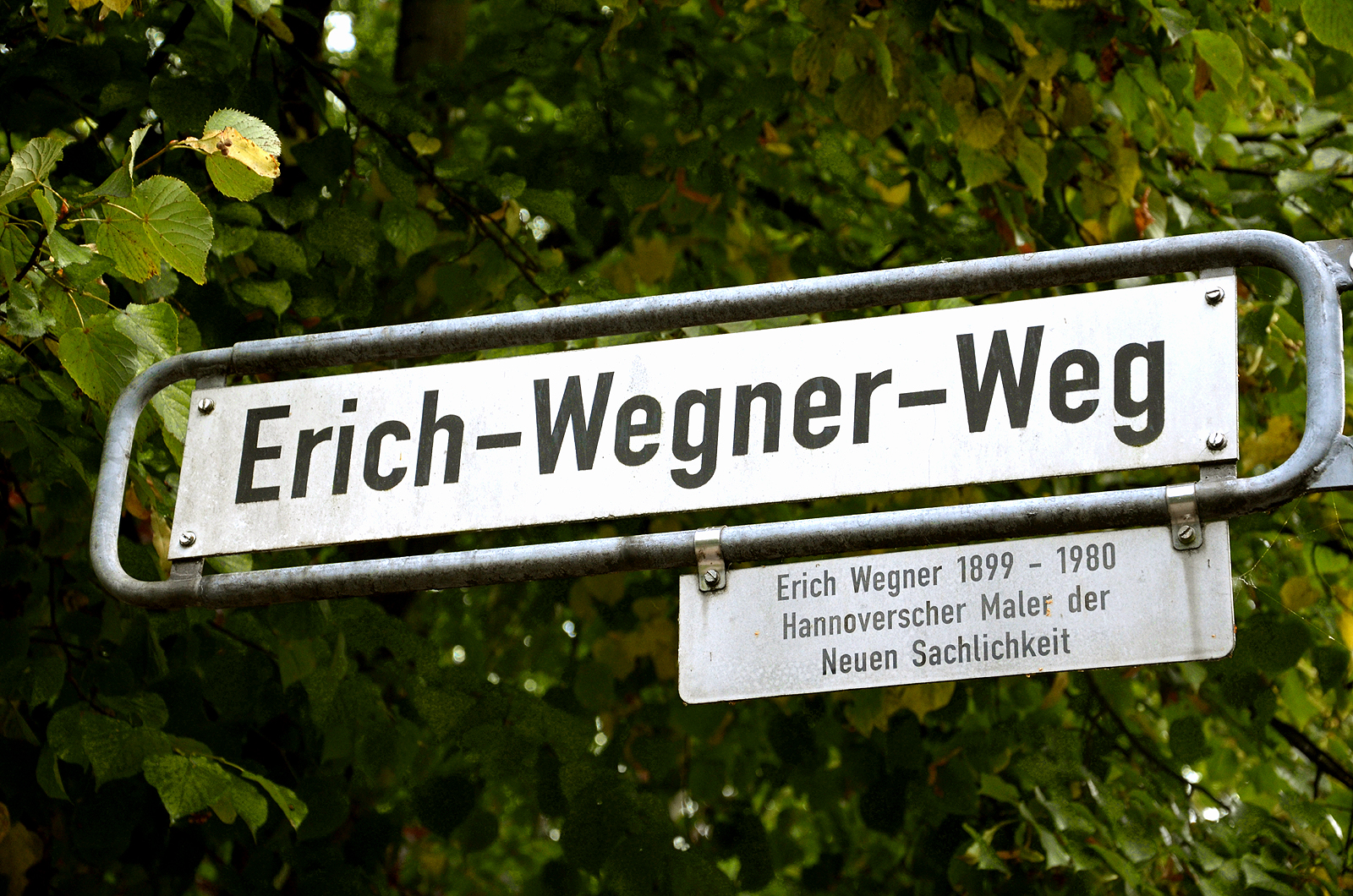 Erich-Wegner-Weg in der Südstadt von Hannover, Straßenschild mit Legendentafel: „Erich Wegner 1899 – 1980 / Hannoverscher Maler der Neuen Sachlichkeit“ ...